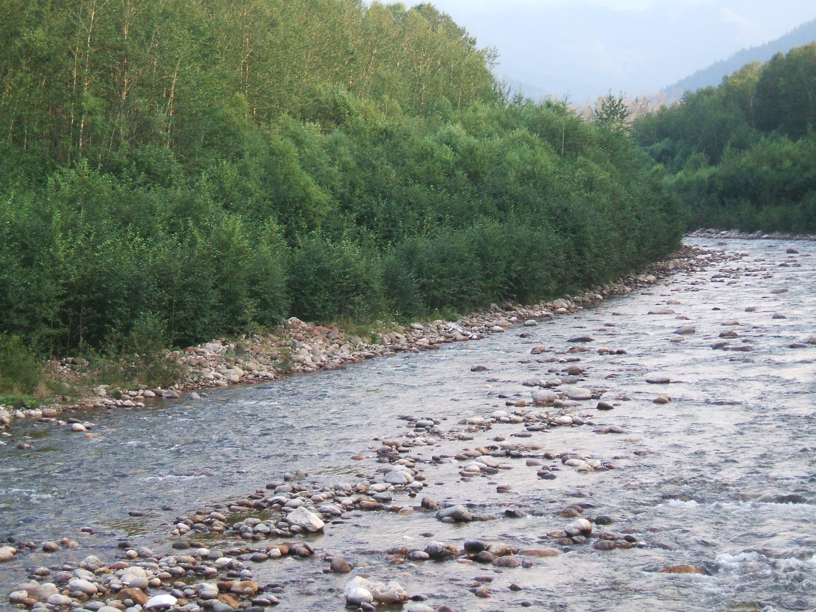 Река Солзан в городе Байкальска